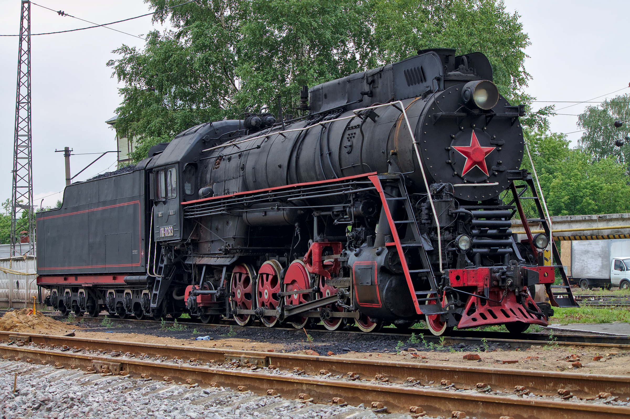 ЛВ-0283, Москва, депо Подмосковная. см. фото 631861 в альбоме автора